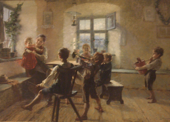 "Das Kinderkonzert"